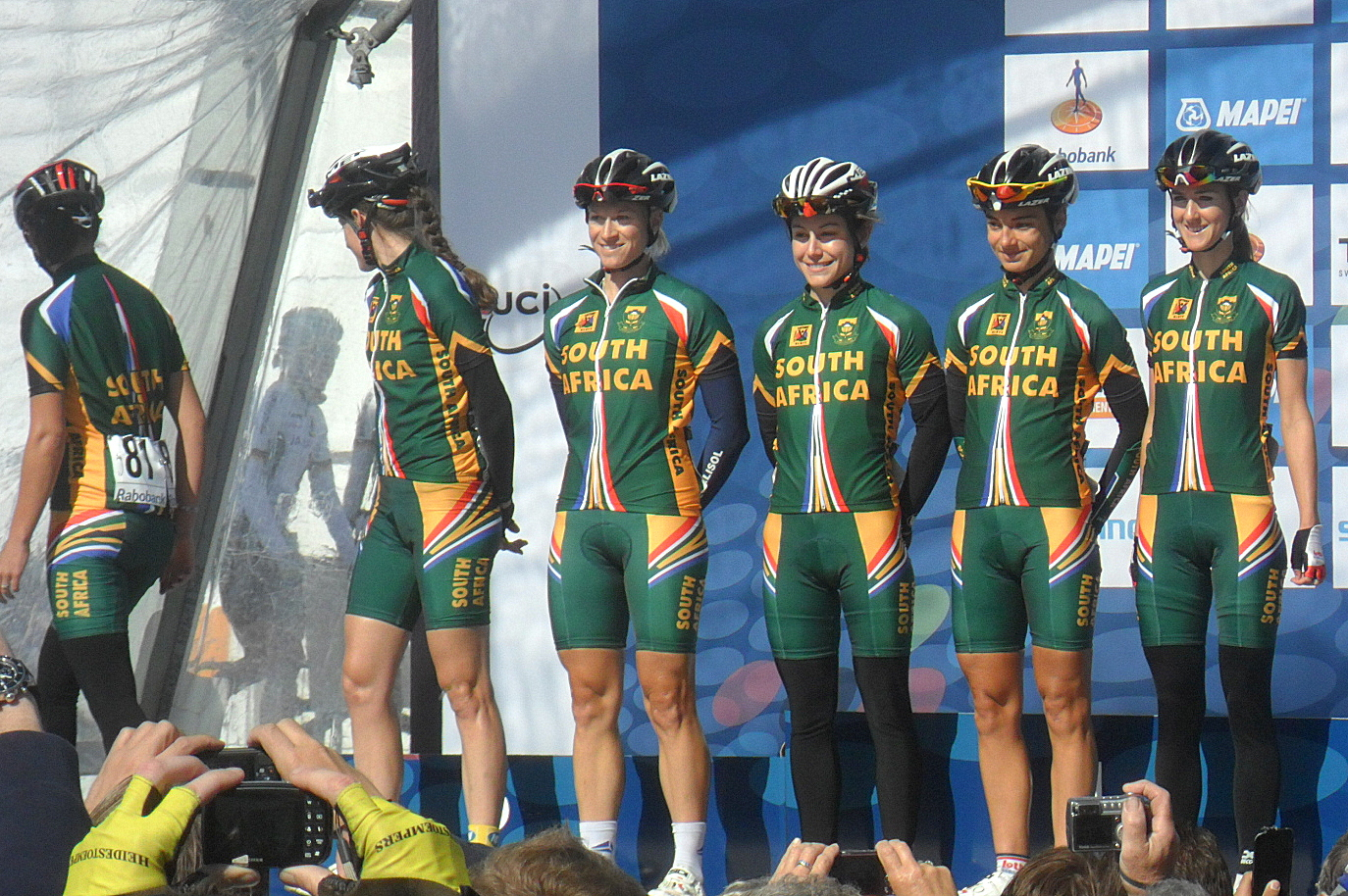 Ploegenpresentatie Zuid-Afrika voor de start van het Wereldkampioenschap 2012 in Valkenburg, Nederland.